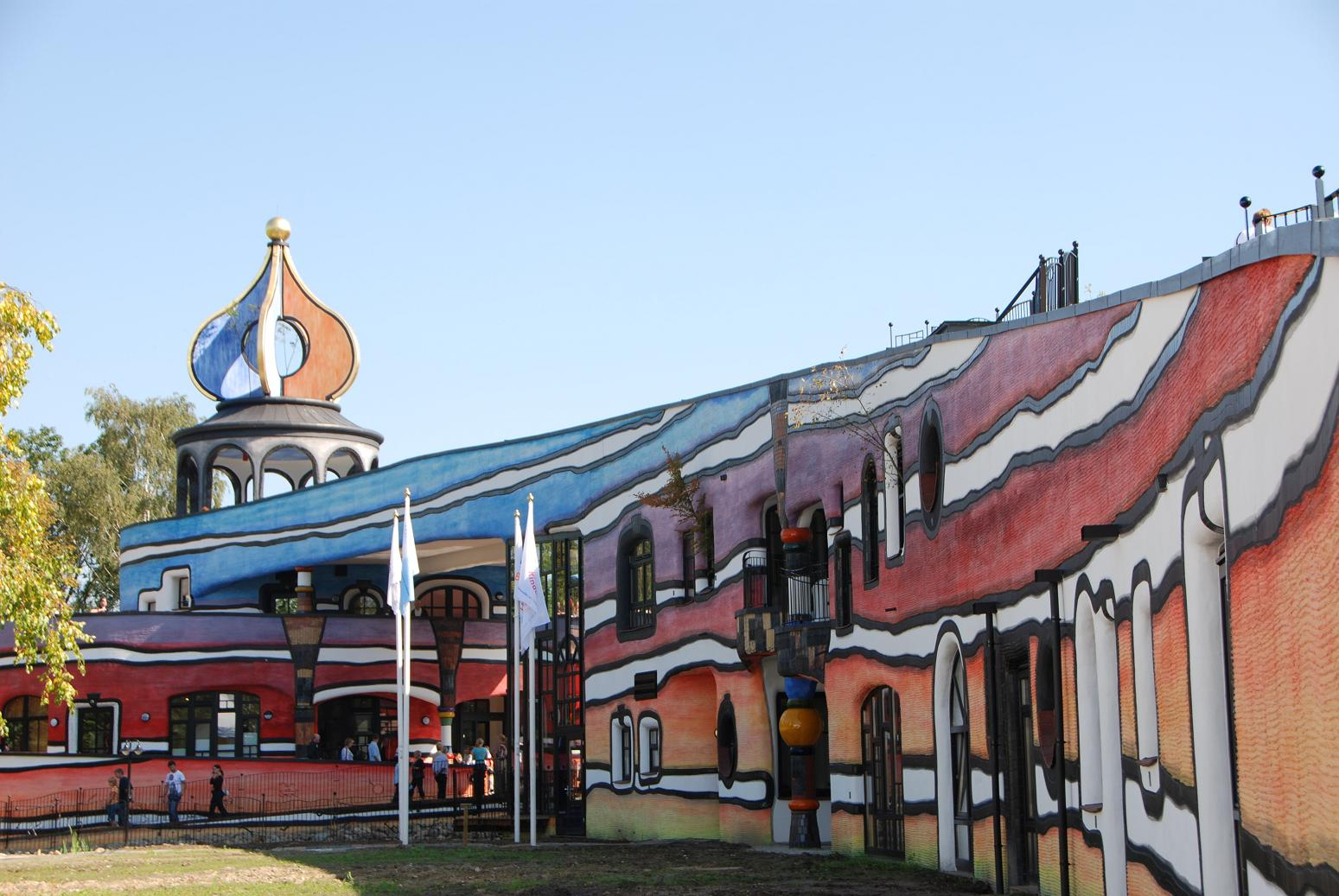 Friedensreich Hundertwasser Ronald Macdonald childsvalley